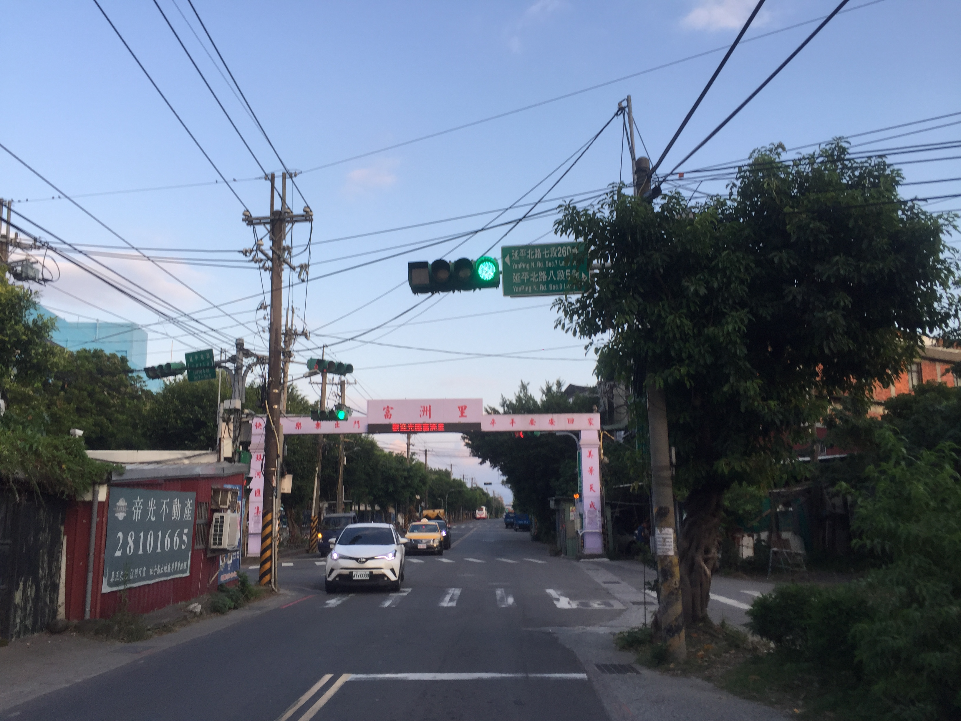 延平北路七、八段分段點（富洲里分界）